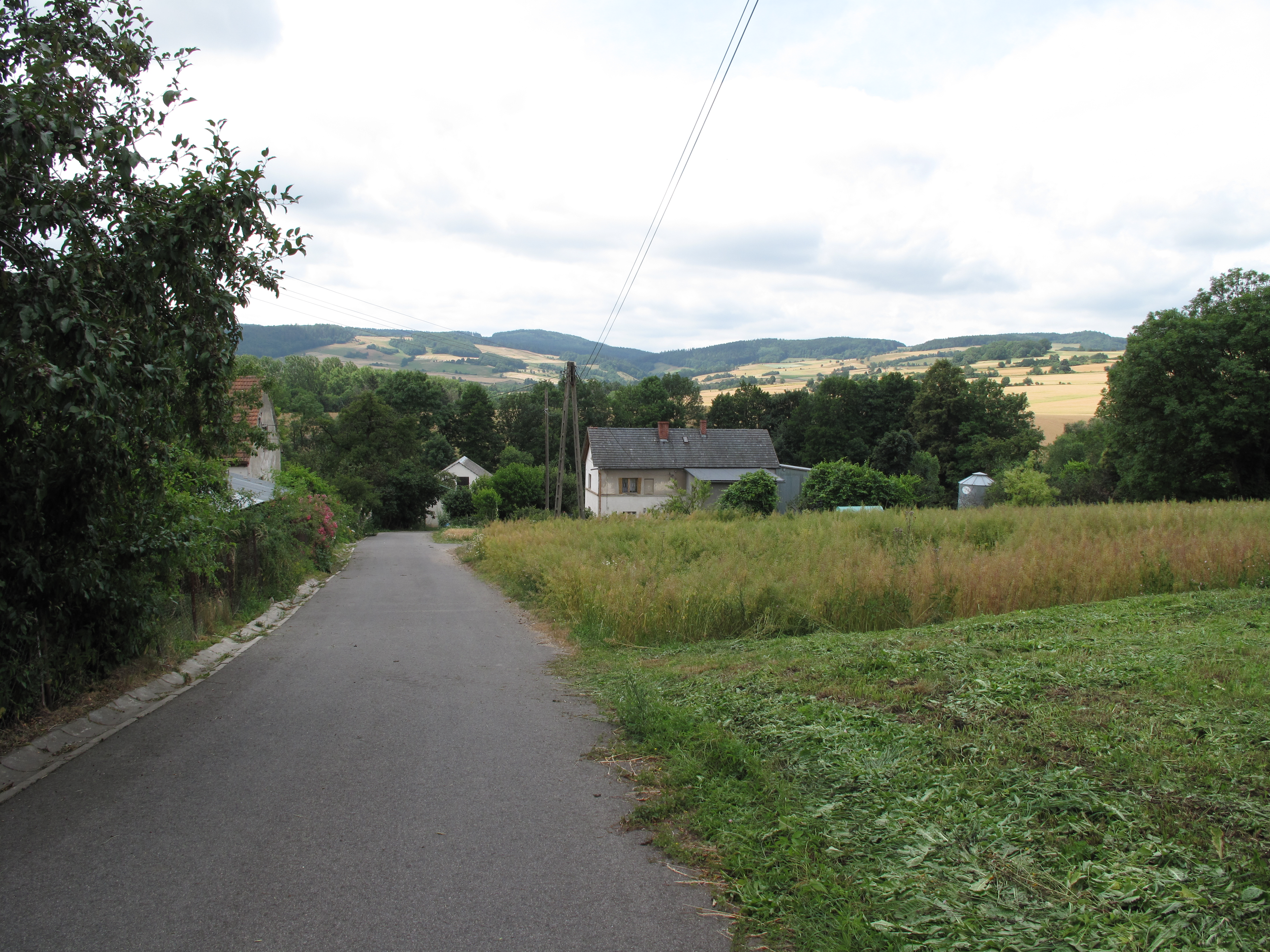 Jeżów (powiat jaworski). Polska.